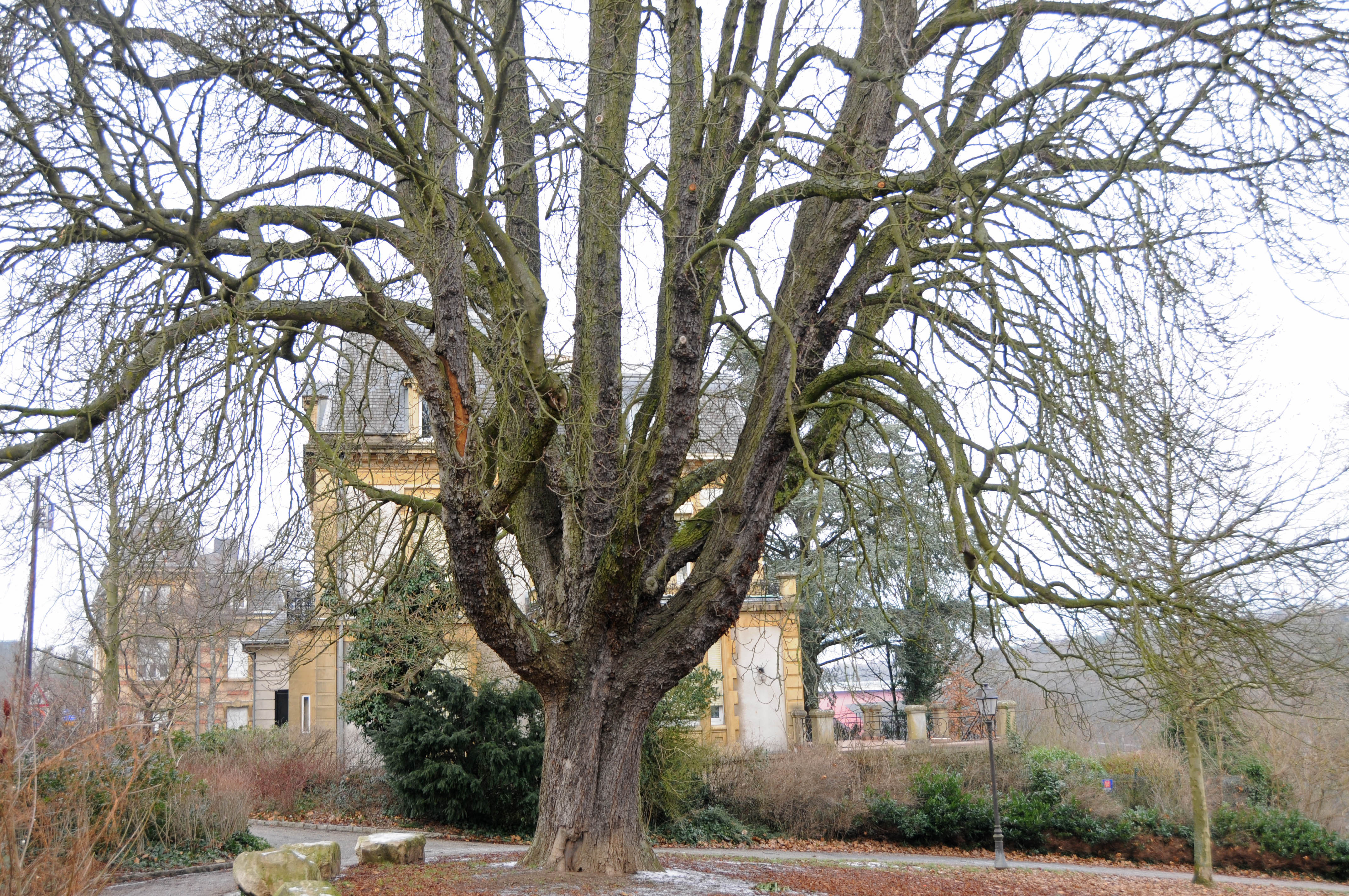 Käschtebam Square R Brasseur Stad